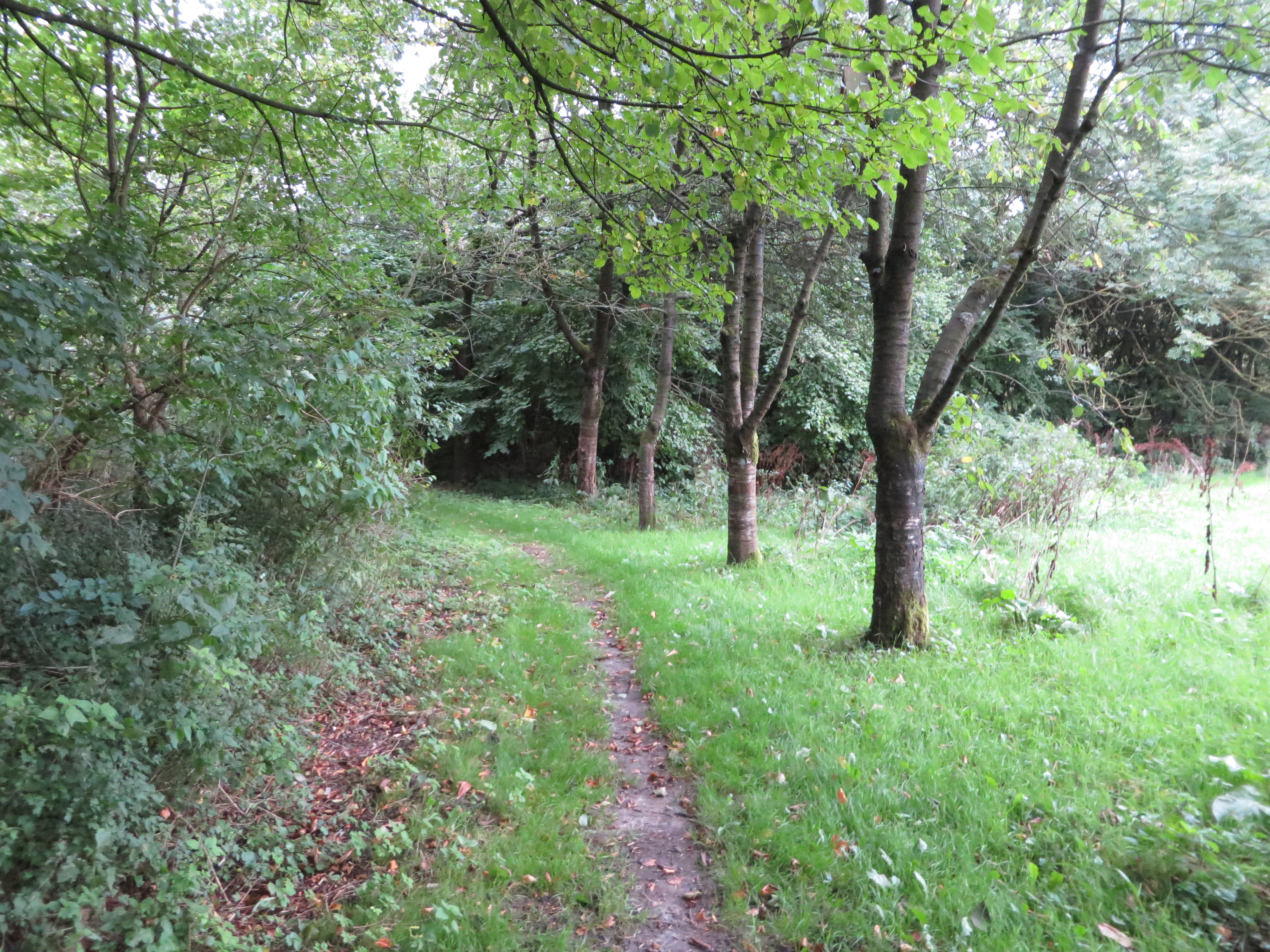 Ententeich im Volkspark (Flensburg September 2014), Bild 01